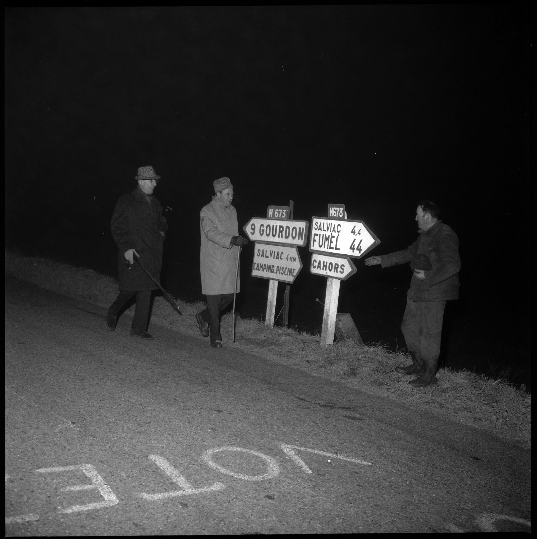 Département du Lot. 6 Janvier 1970. Vue de Maurice Faure et d'Irénée Lacombe ainsi que d'une troisième personne marchant sur une route du Lot.